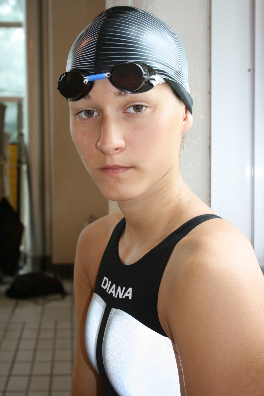 Zuzanna Mazurek - pływaczka. Złoty medal Mistrzostwa Świata Juniorów